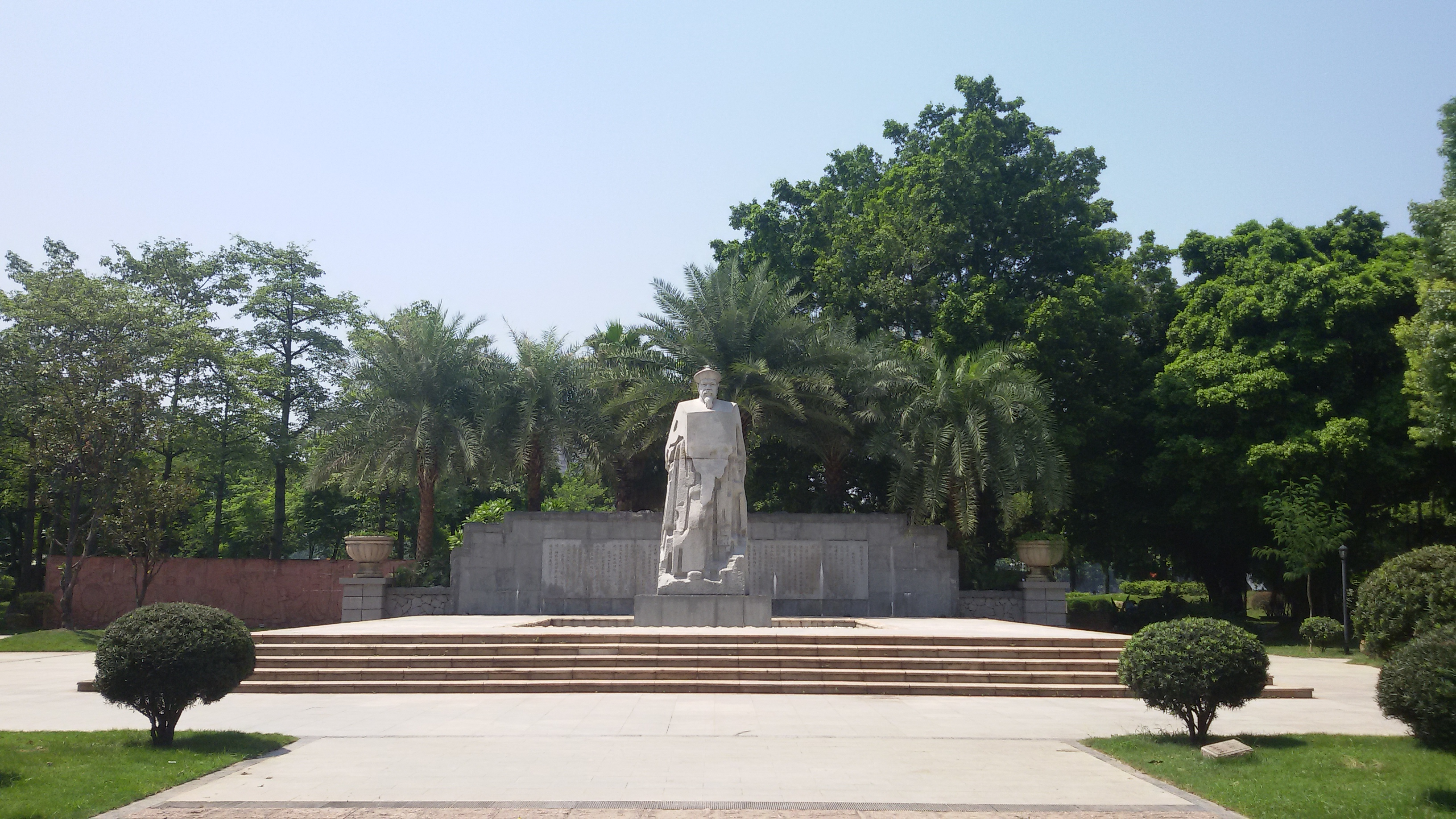 粵語: 林則徐紀念園嘅林則徐雕像